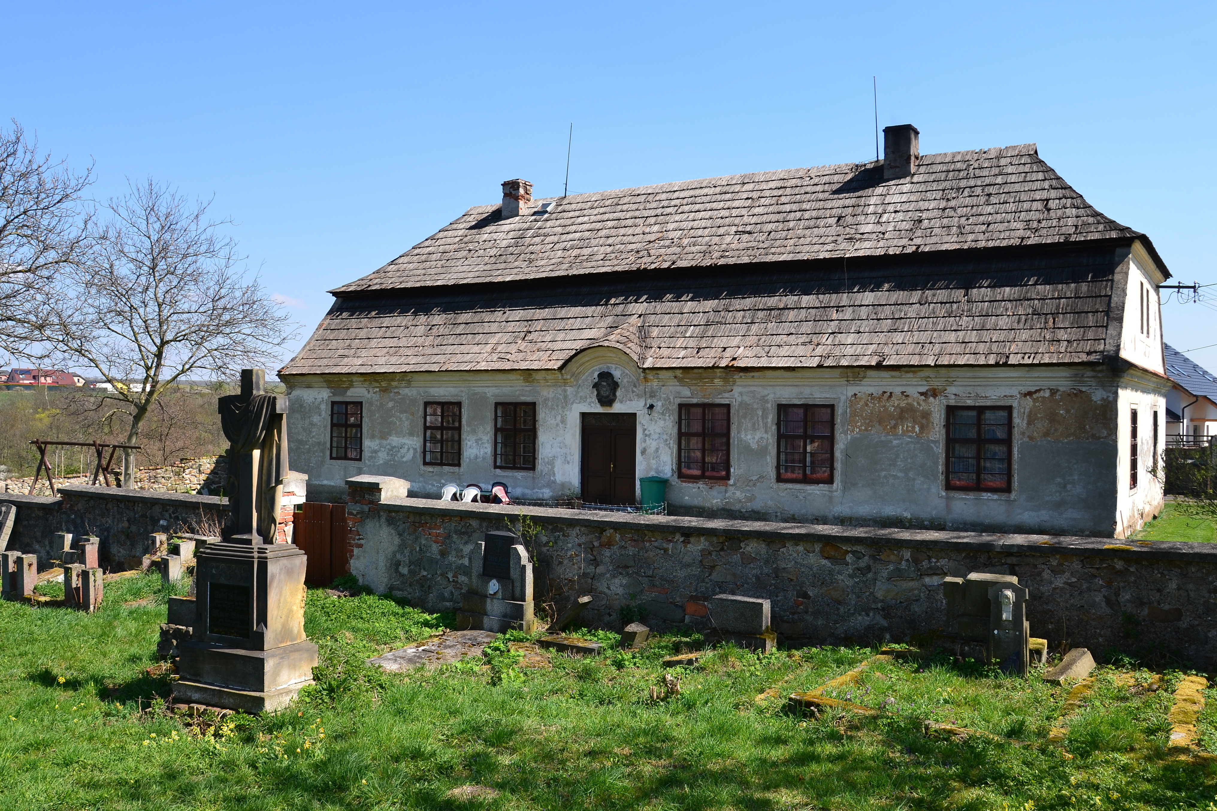 Západní průčelí, Želina 1, Želina.